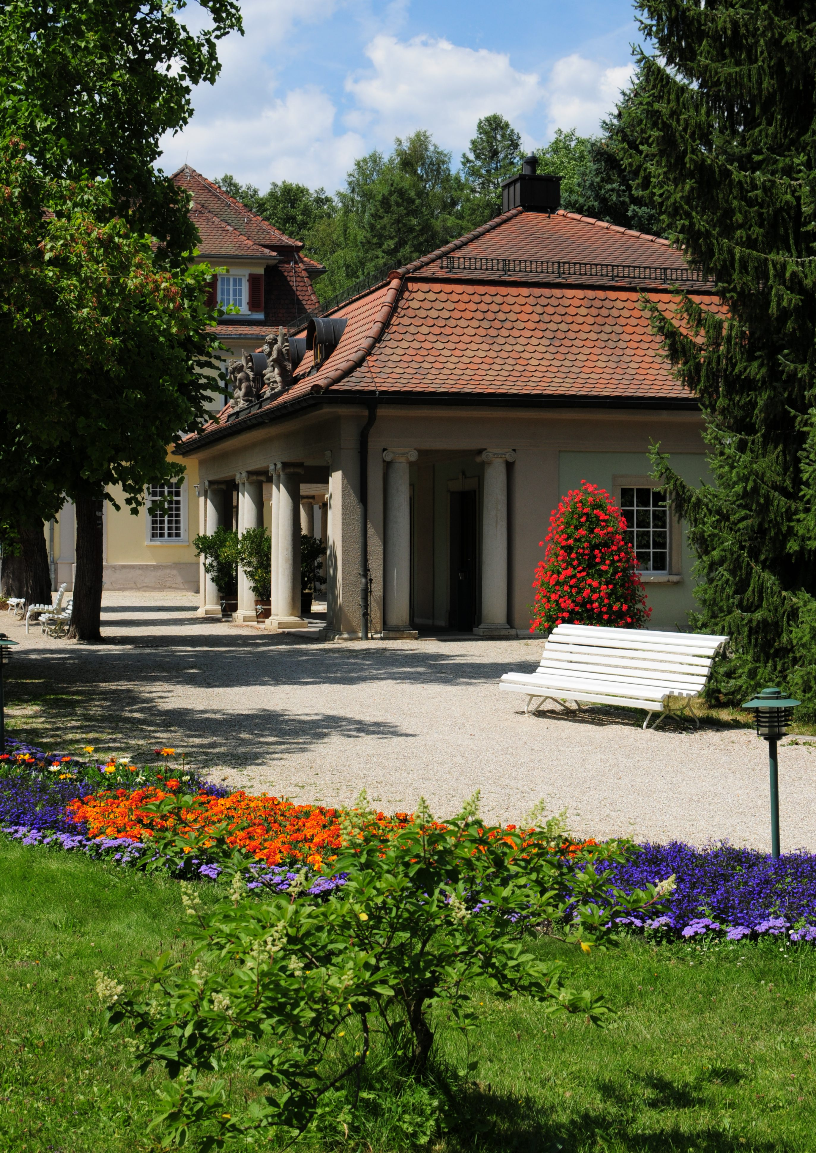 Gemeinde Bad Brambach, Kurpark Bad Brambach, Wettinquelle (Vogtlandkreis, Freistaat Sachsen, Deutschland)